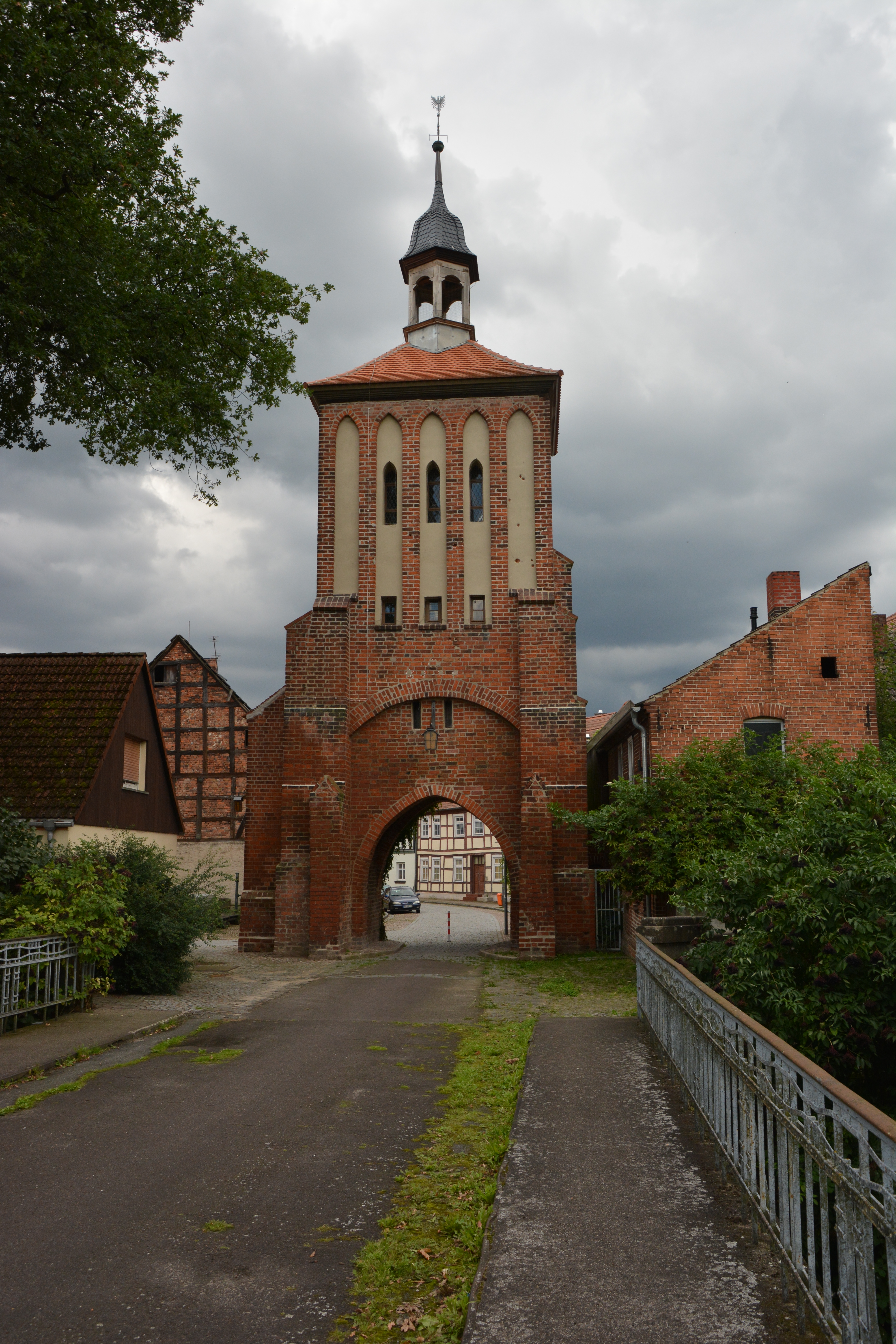 Seehausen (Altmark) Beustertor